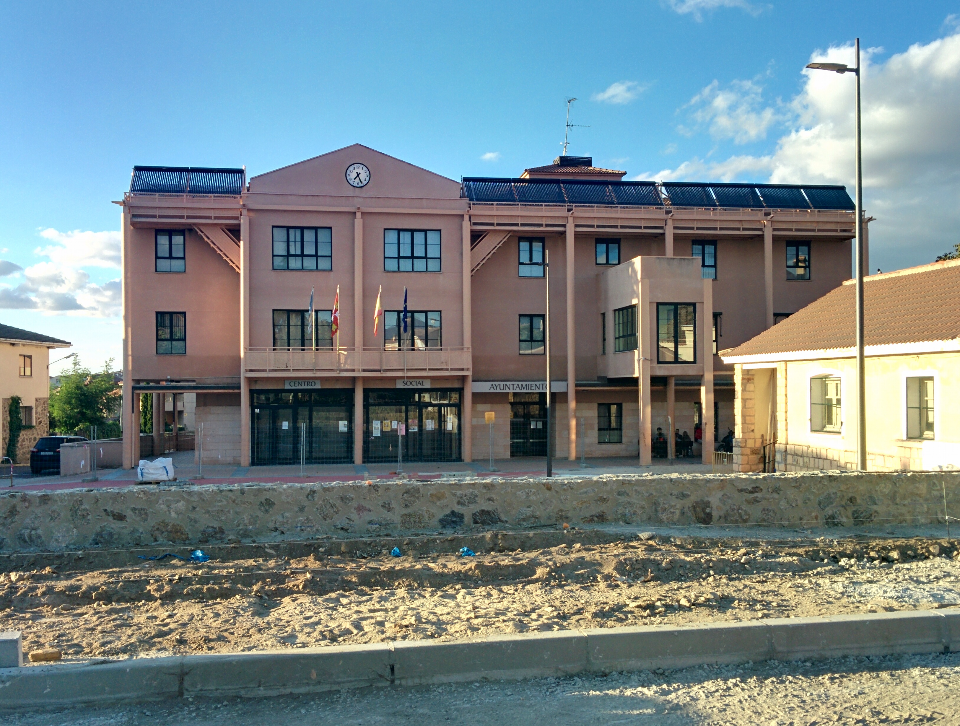 Casa consistorial de Palazuelos de Eresma (Segovia, España).